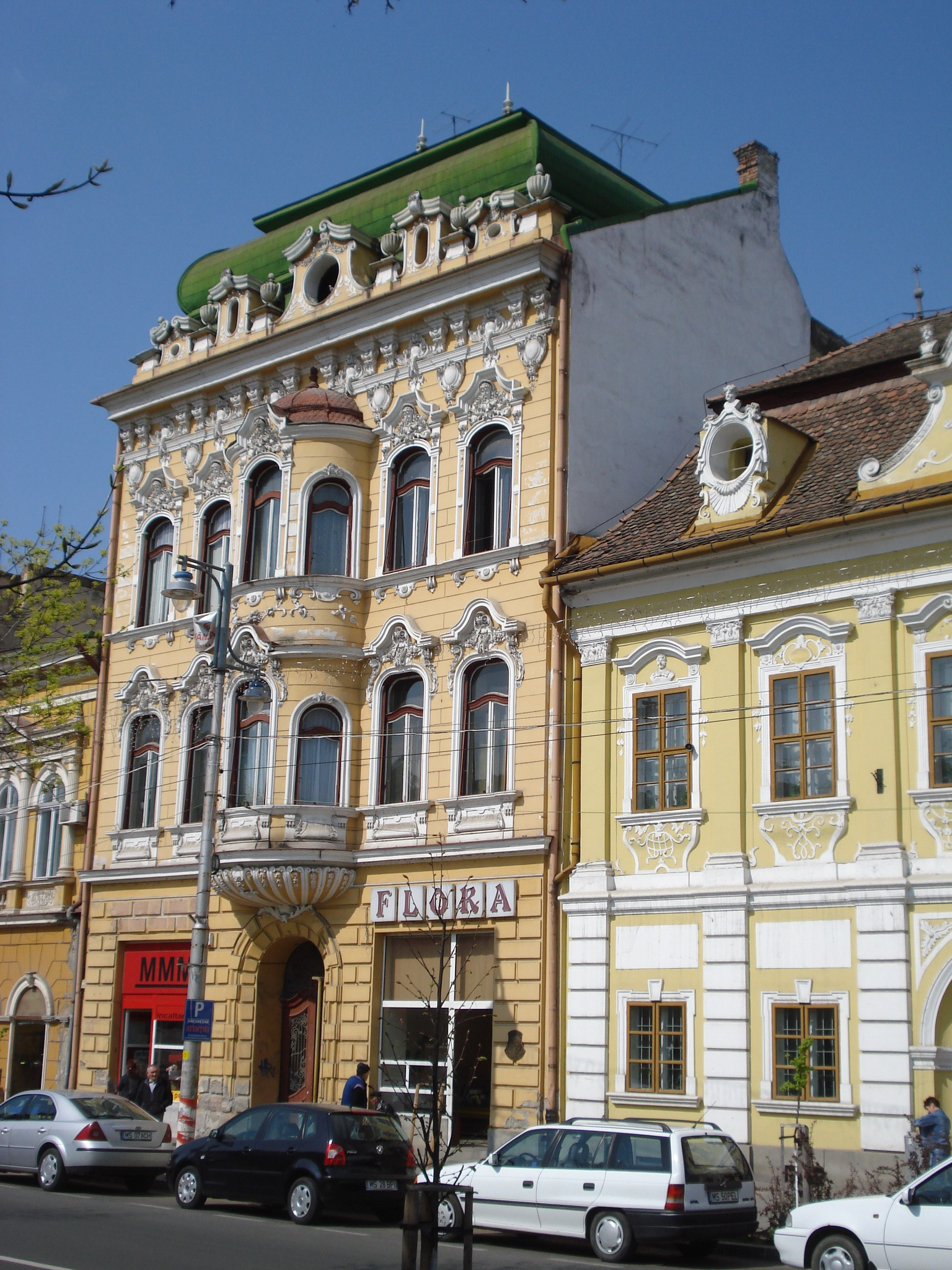 Bányai House, Târgu Mureş (Gy. Nagy, 1904-07)